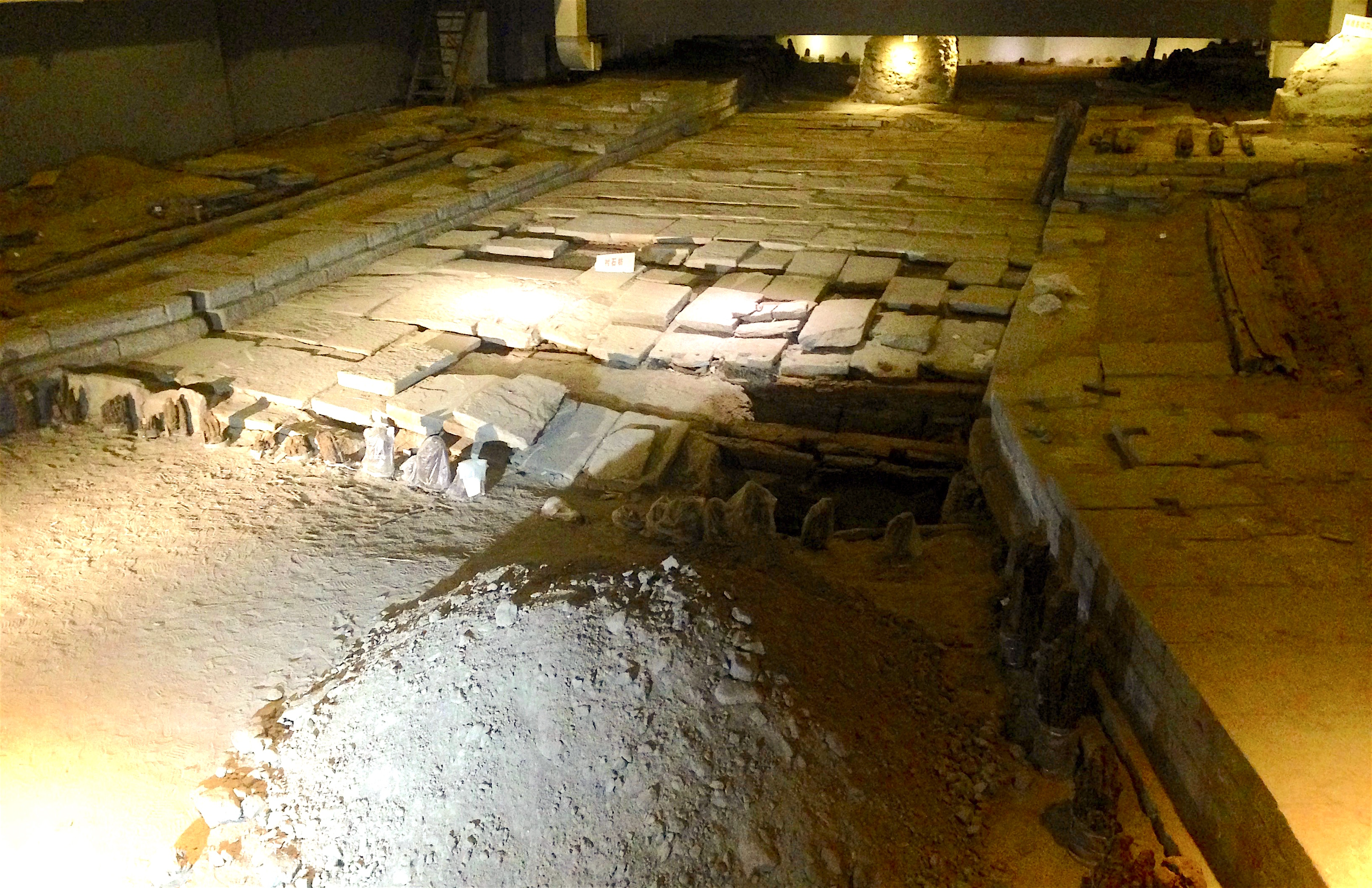 Vattenpassag i Zhongdu's södra stadsmur utställd på Beijing Lioa Jin city wall museum